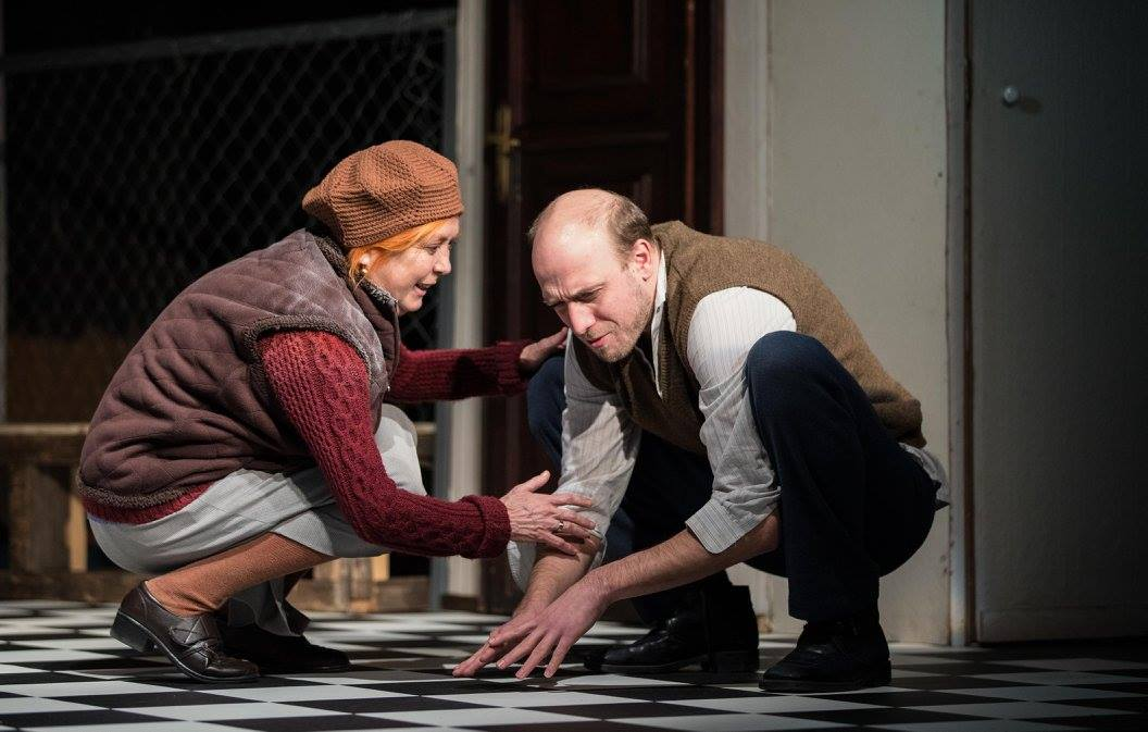 Háy János: A Gézagyerek című előadás a Pinceszínházban, Soós Péter rendezésében (Börcsök Enikő, Takács Géza)